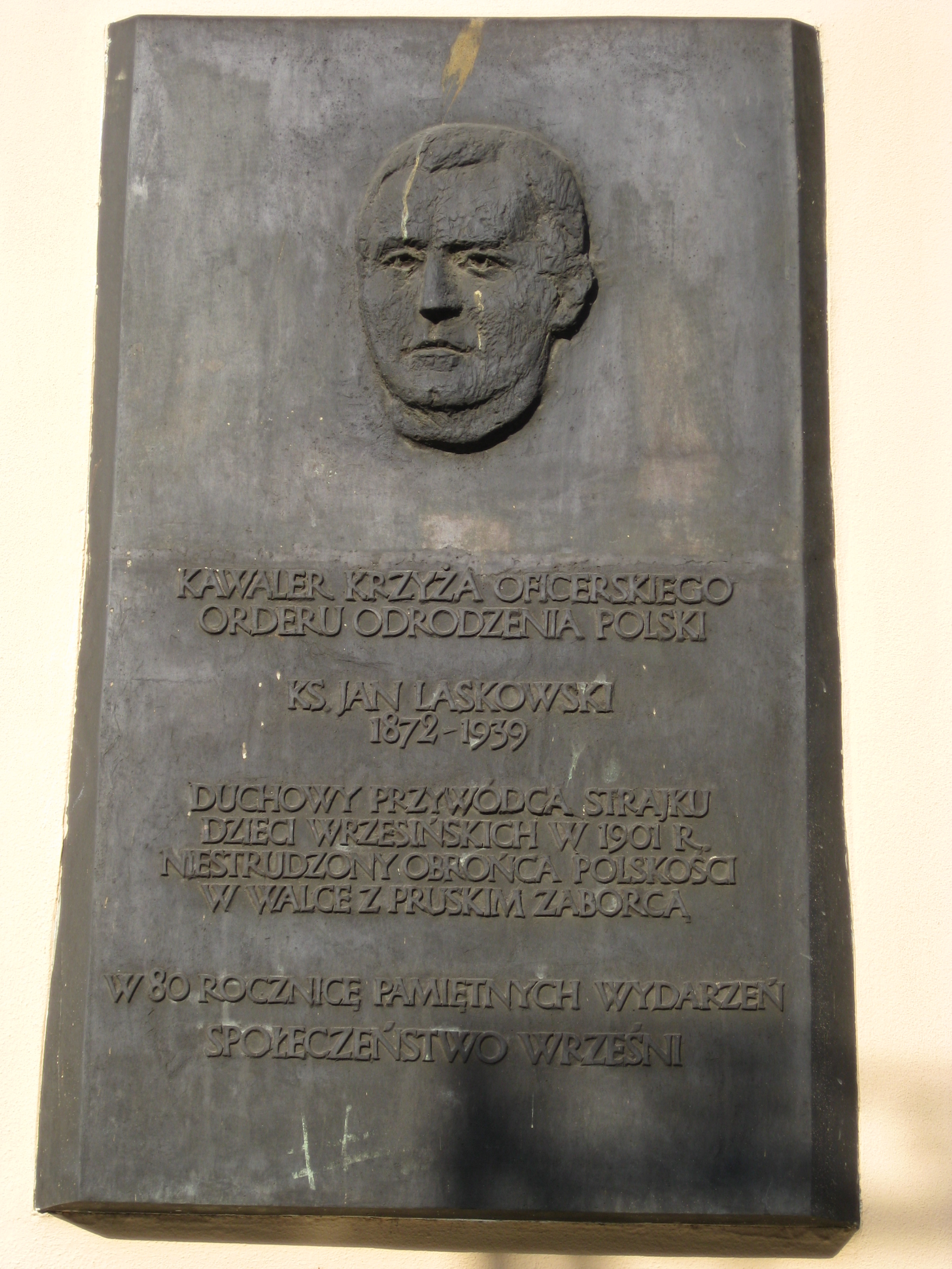 Tablica pamiątkowa poświęcona ks. Janowi Laskowskiemu - Września